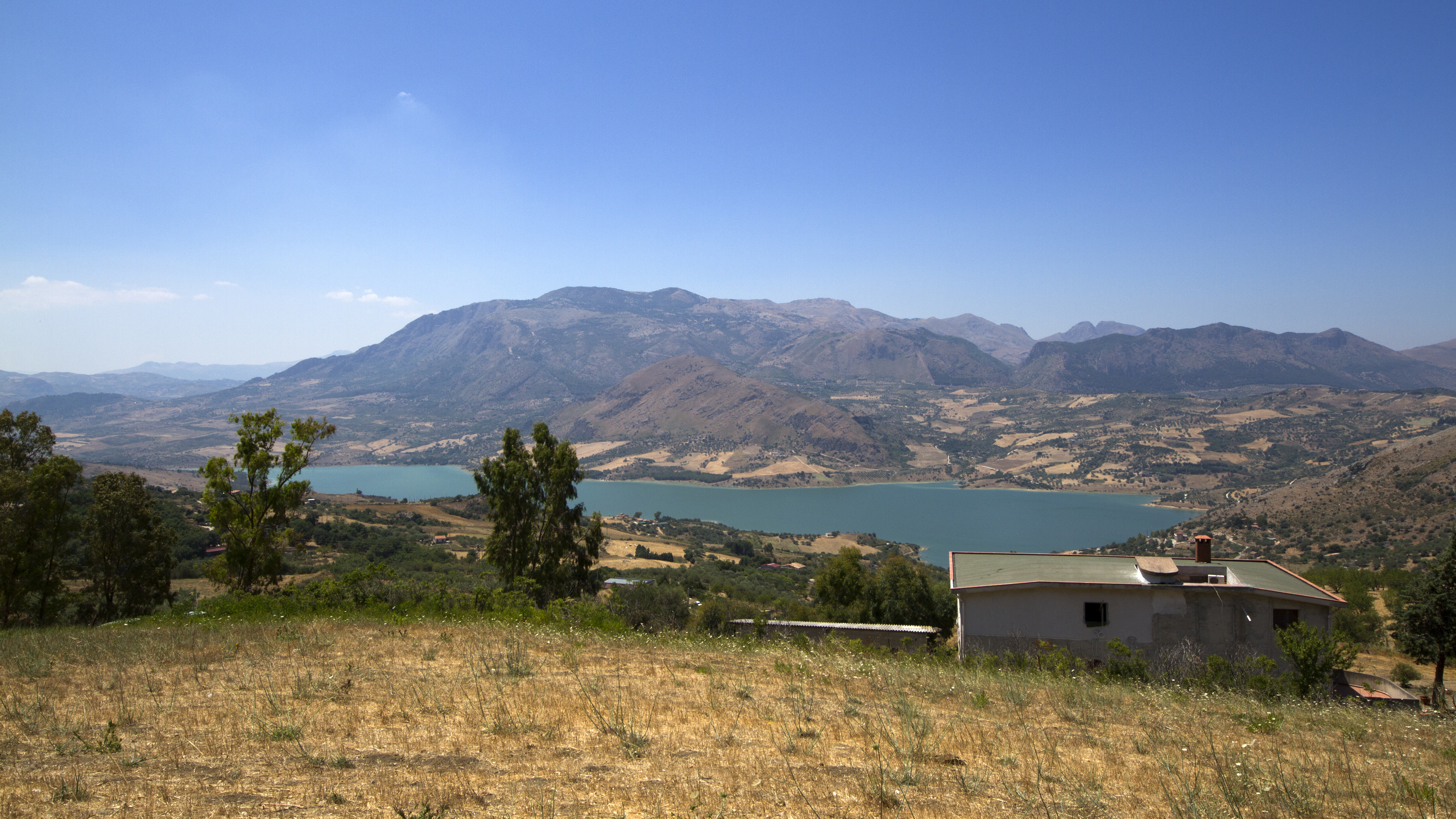 Lago Rosamarina, Caccamo, Province of Palermo, Sicily, Italy